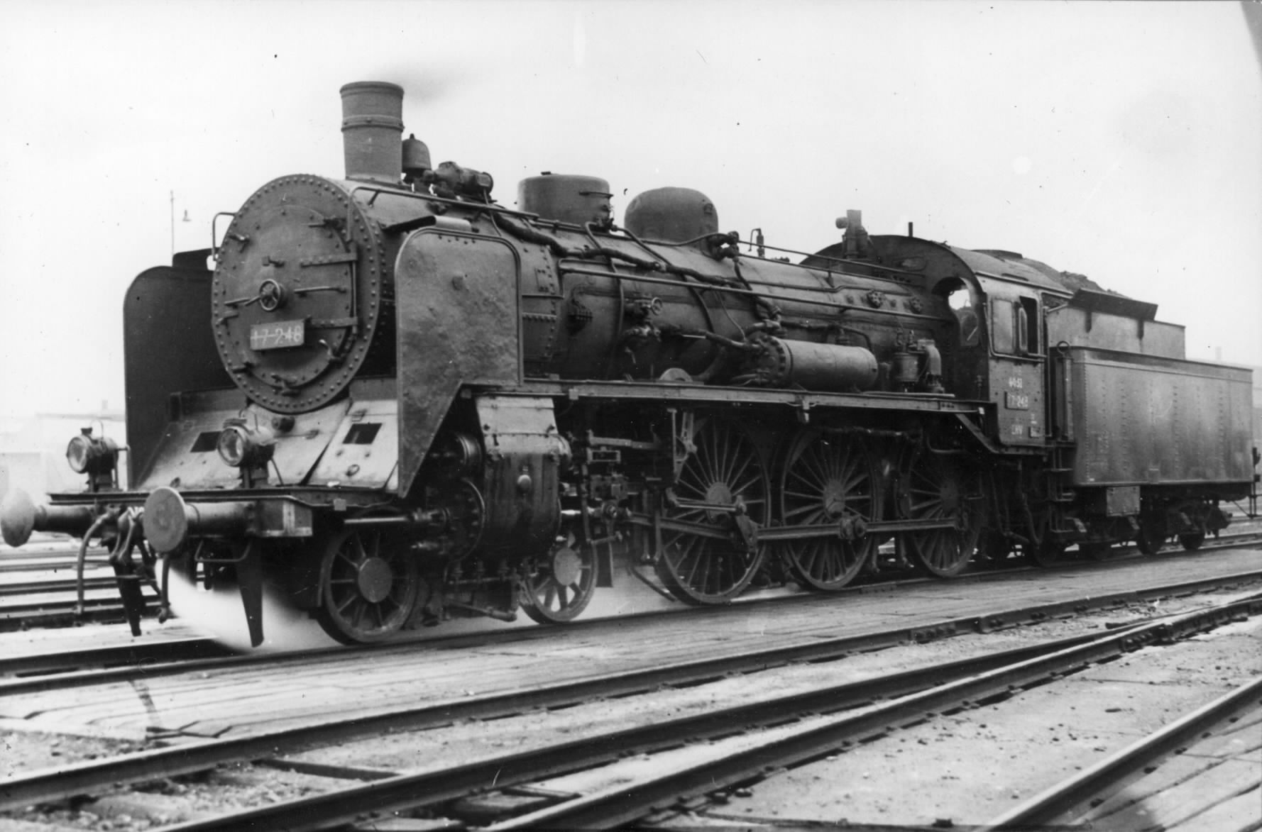 Afbeelding van de stoomlocomotief nr. 4051 (serie 4000) van de N.S., afkomstig van de D.R.B. (Deutsche Reichsbahn, oorspronkelijk nummer 17 248) te Eindhoven.